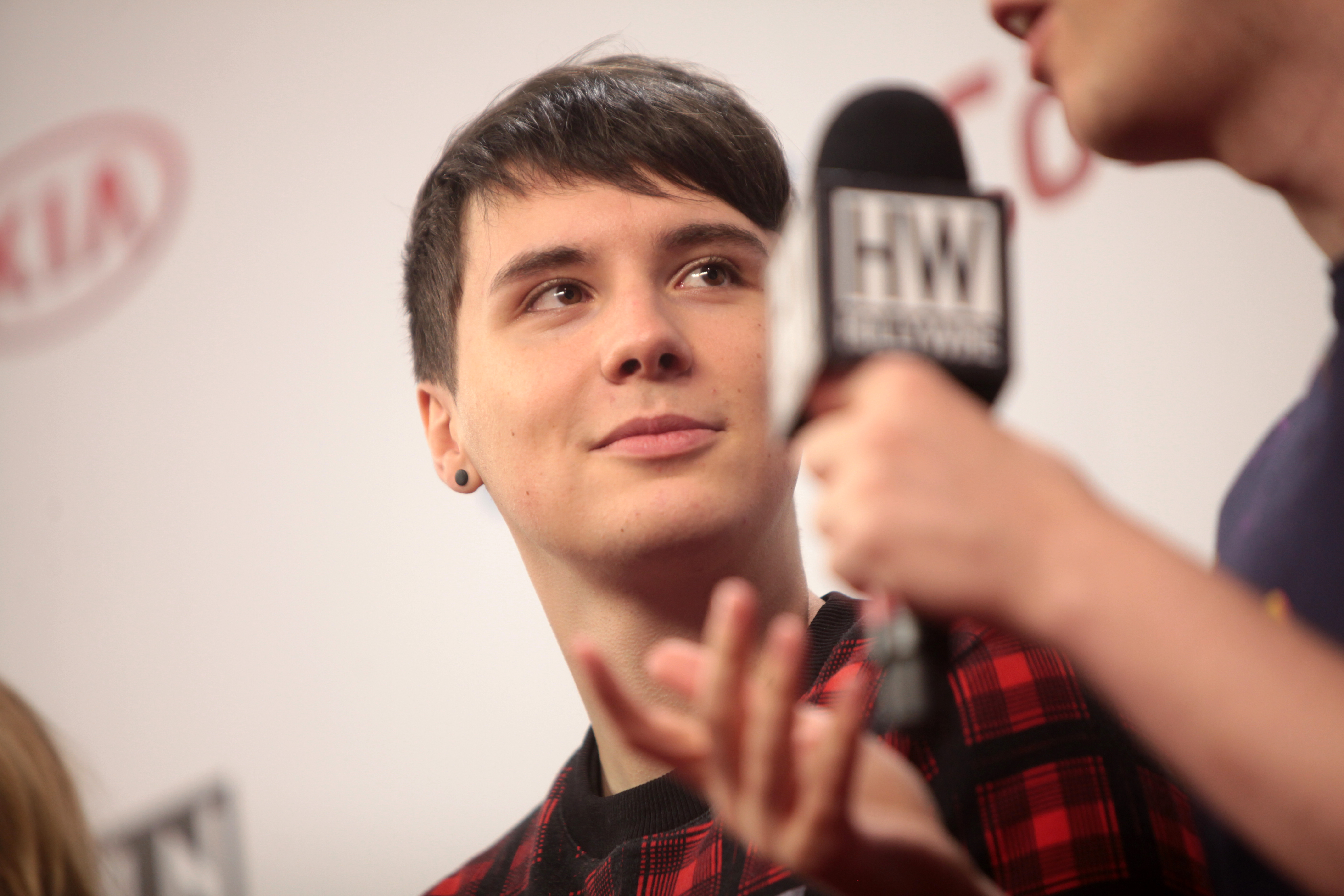 Dan Howell Youtuber